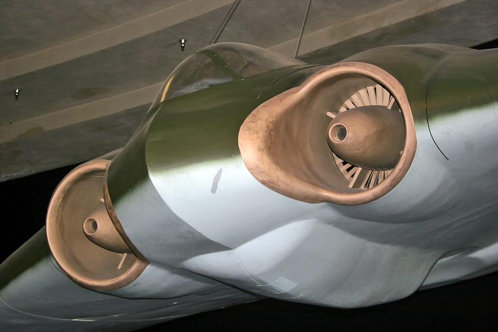 San Diego Air & Space Museum - Balboa Park